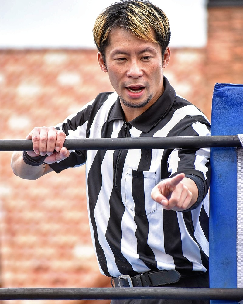 プロレスのレフェリー石黒淳士